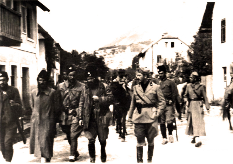 Srpskohrvatski / српскохрватски: Talijani i četnici u Prozoru 1942. godine, tokom operacije Alfa.